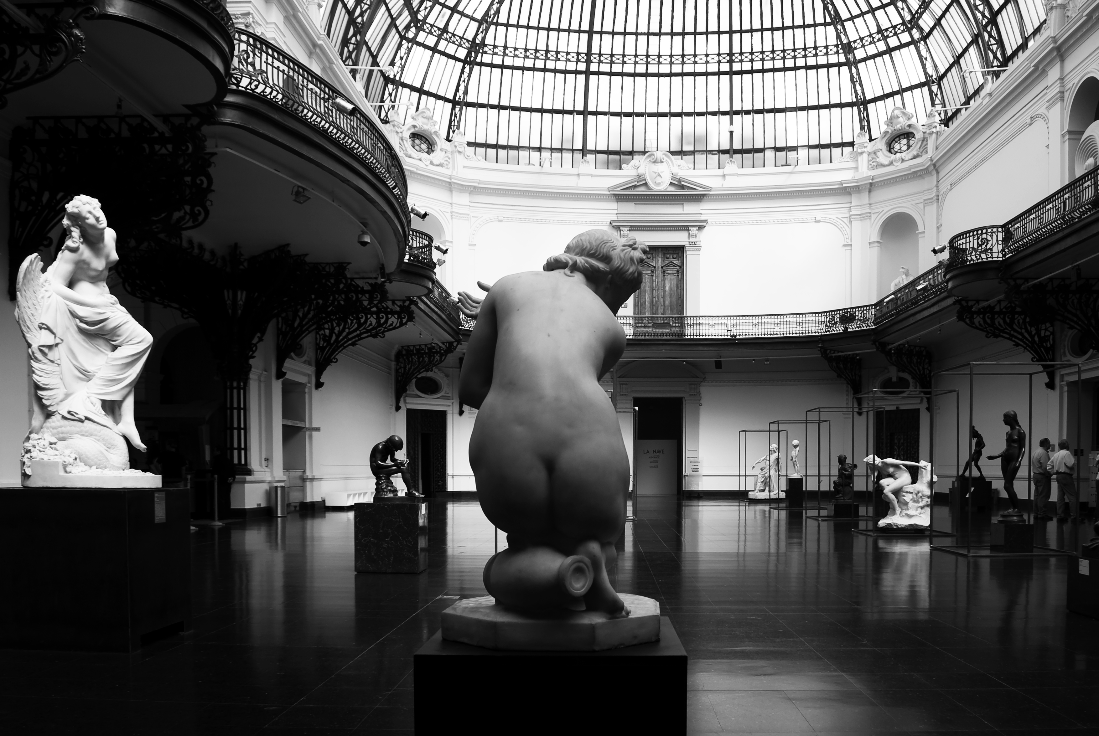 Interior del Museo Nacional de Bellas Artes. Cómo las obras colonizan el espacio convirtiéndose en parte de él y a su vez, son espectadoras del mismo. This is a photo of a national monument in Chile: 830